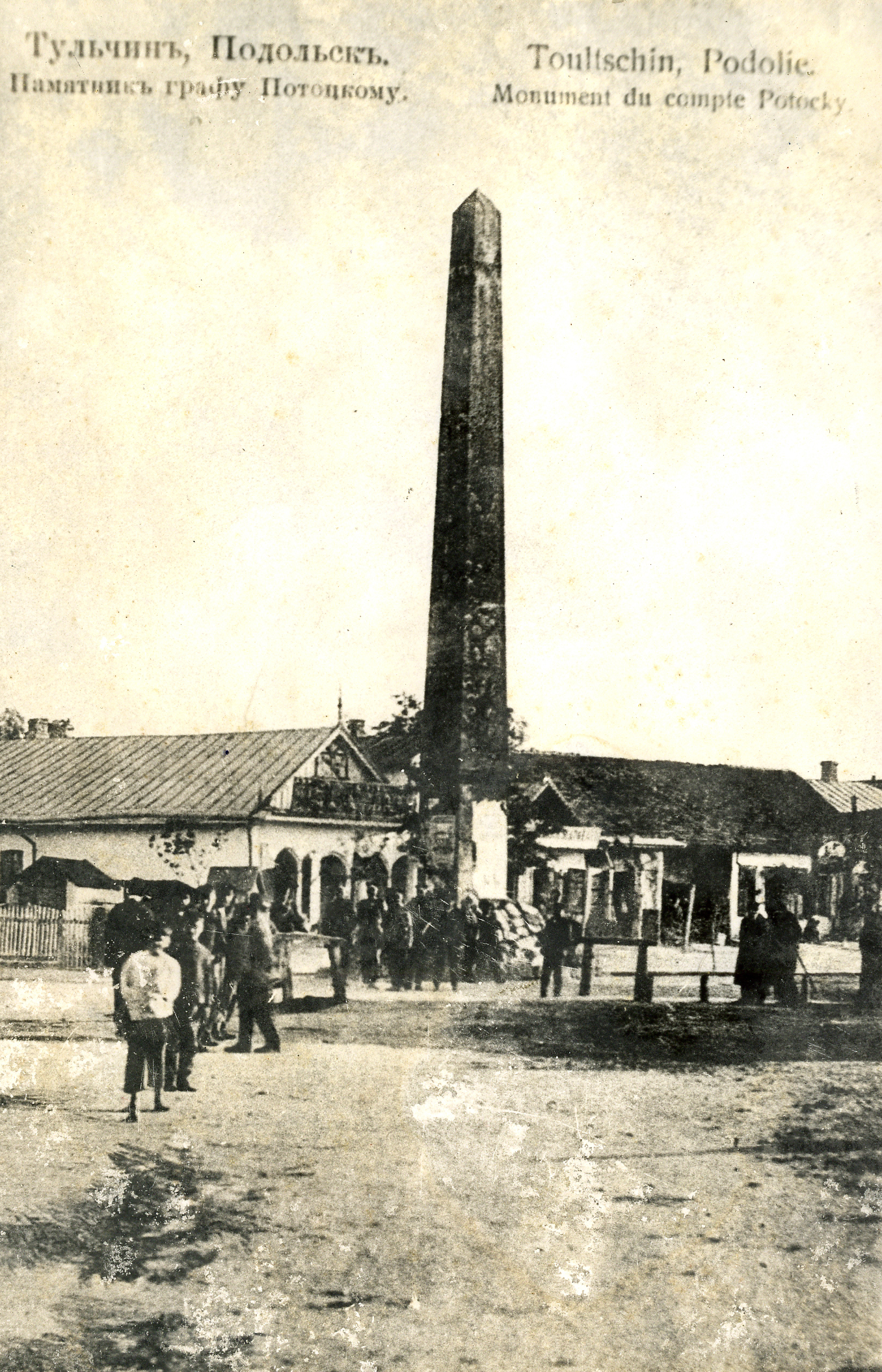 Обелиск в честь приезда польского короля в Тульчин